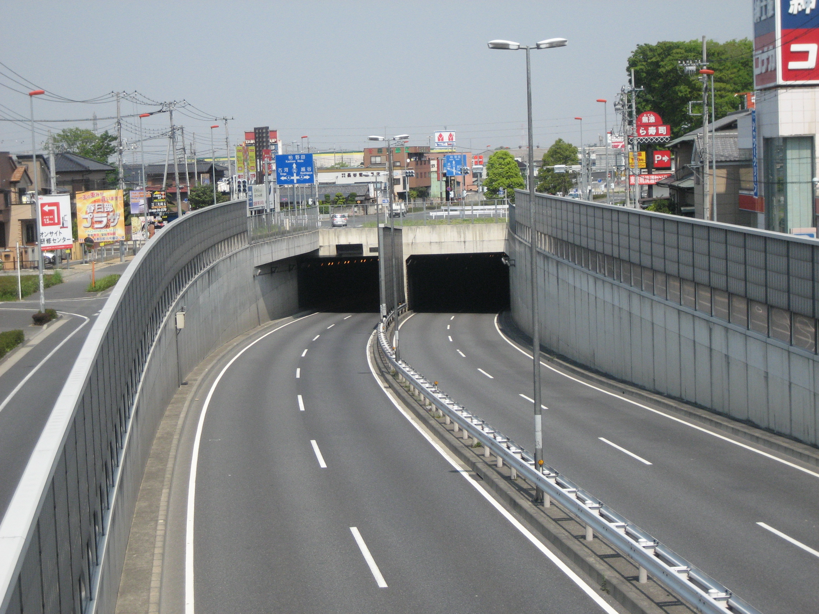 国道16号線小渕立体交差